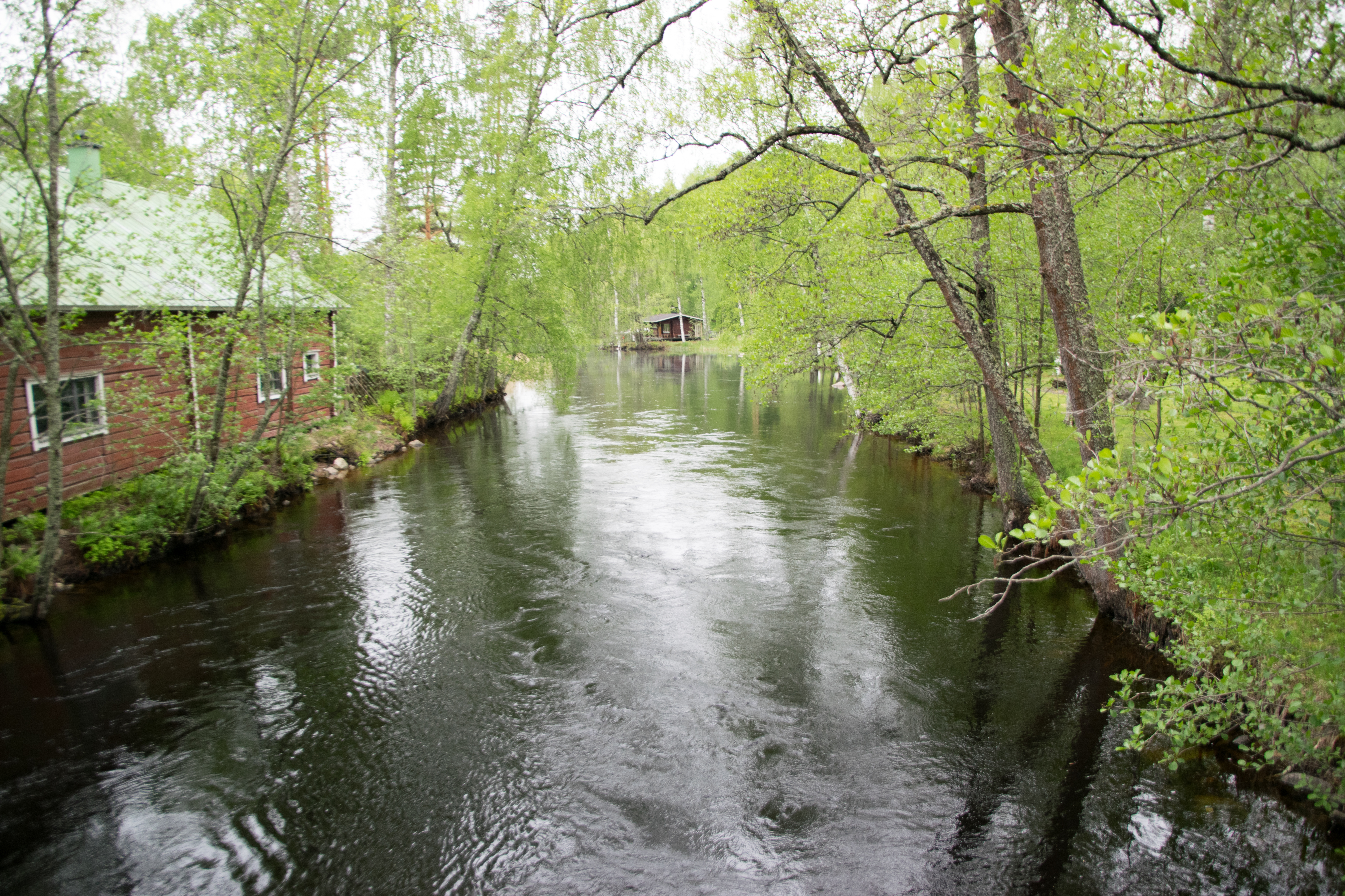 Käyhkään kanava